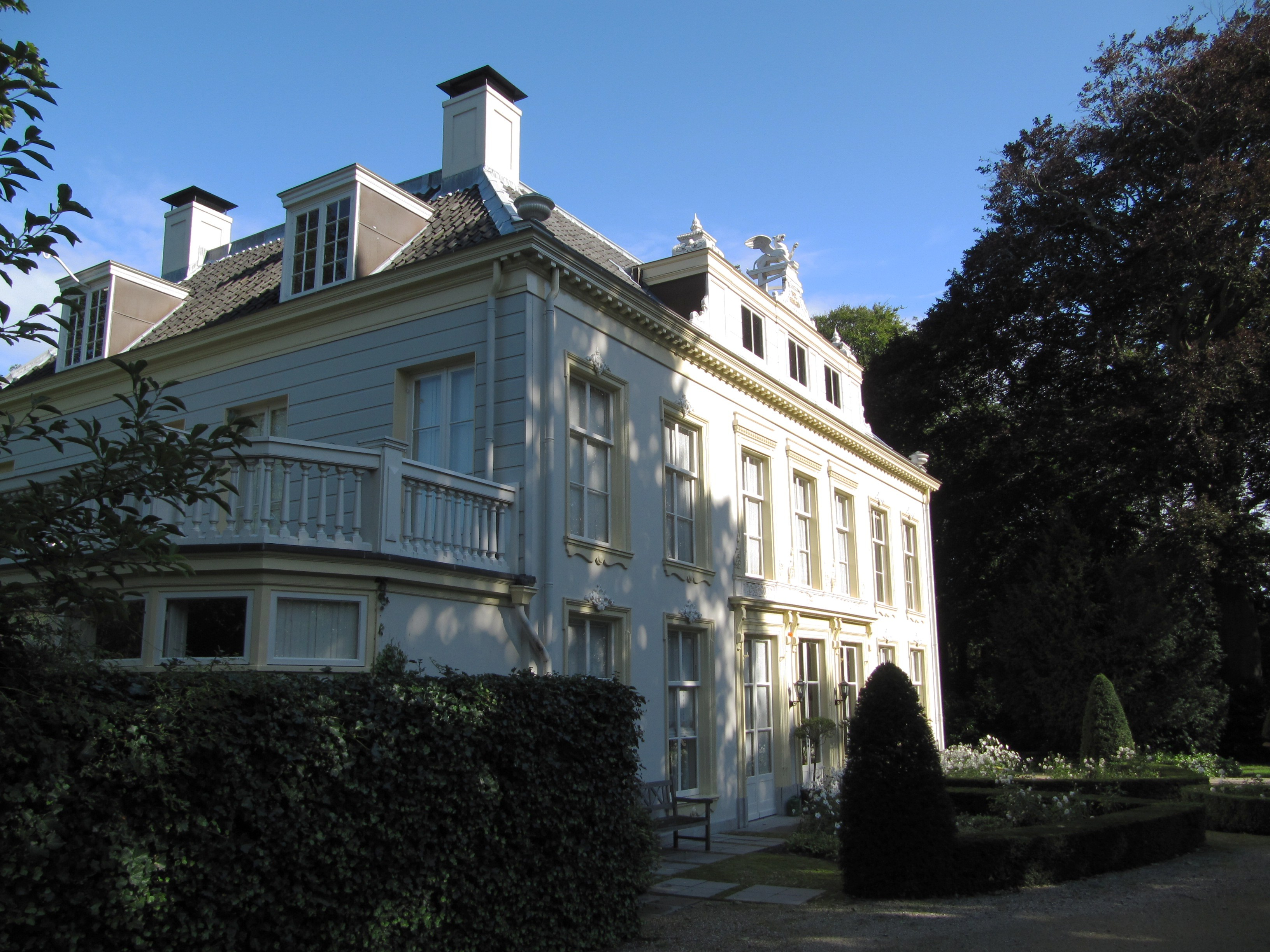 RM506916 Rijswijk - Welgelegen.jpg